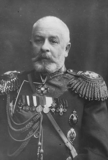 Генерал-адъютант, градоначальник Петербурга Иван Александрович Фуллон (1844-1920) (портрет).